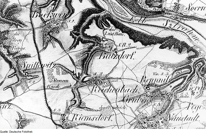 Original image description from the Deutsche Fotothek Klipphausen-Batzdorf. Oberreit, Sect. Dresden, 1821/22